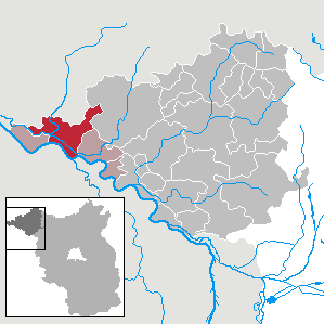 Lenzen (Elbe) in Brandenburg (Country) - District Prignitz